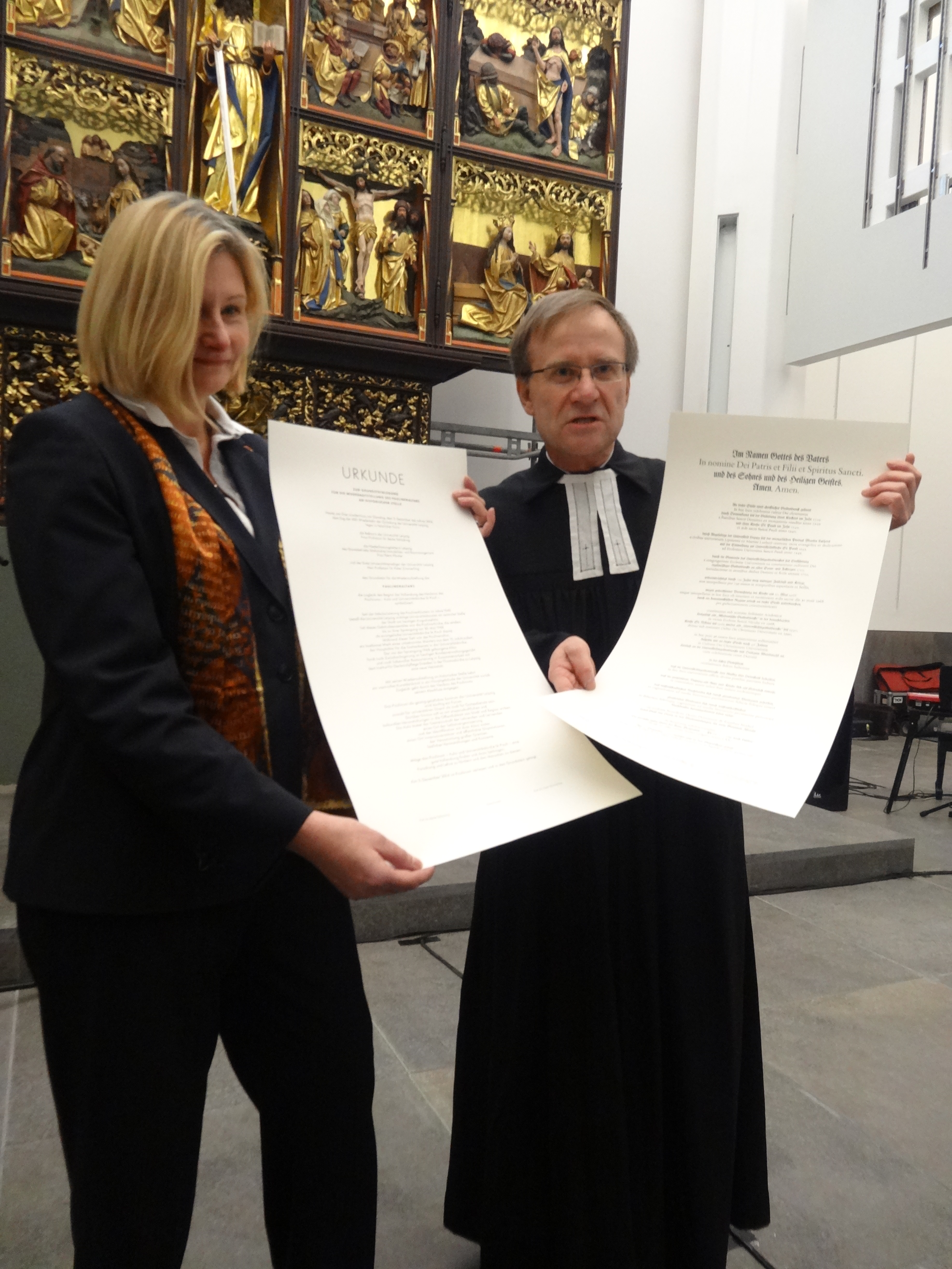 Altargrundsteinlegung für den Pauliner-Altar in der Universitätskirche St. Pauli am 02.12.2014, links Petra Förster vom SIB und rechts der erste Universitätsprediger Peter Zimmerling mit den Urkunden der Universität und der Theologischen Fakultät